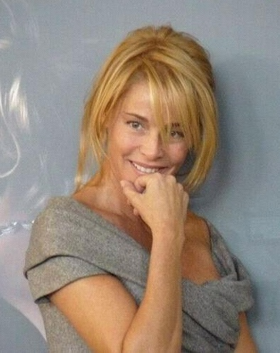 Belén Rueda en la presentacion de El Cuerpo en Madrid